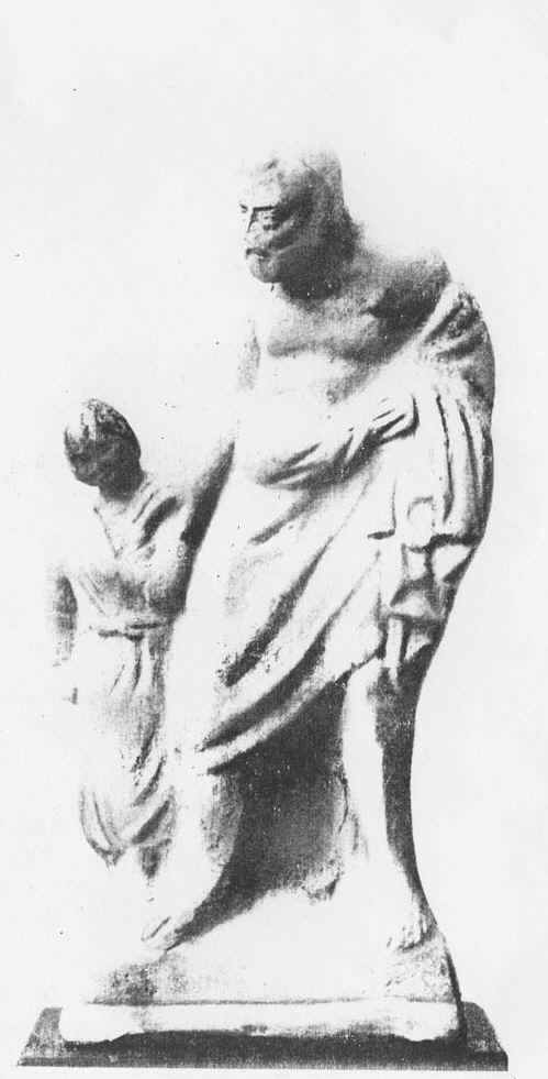 Pequena estatueta grega em terracota do escravo pedagogo